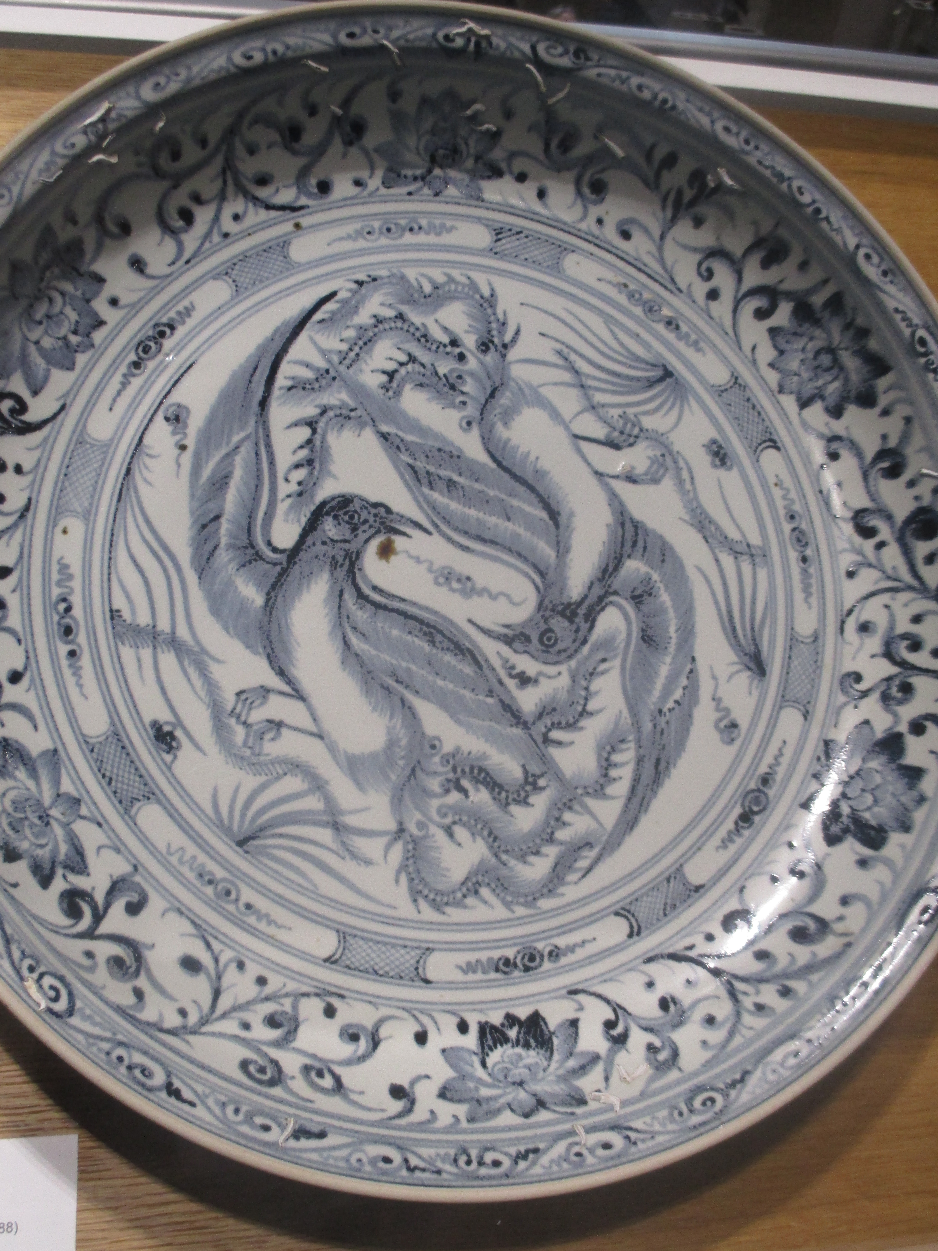 Musée Cernuschi (Paris) ː art du Viêt Nam. Grand plat aux phénix. Nord du Viêt Nam. Dynastie des Lê postérieurs (1428-1788), milieu du XVe siècle. Grès à décor bleu et blanc sous couverte. Achat en 2016. Inventaire M.C. 2016-57.